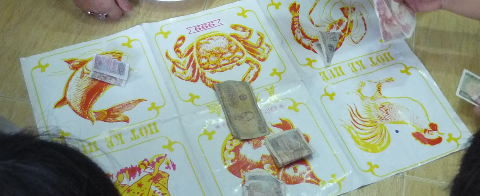 Mot ban bầu cua tại Việt Nam